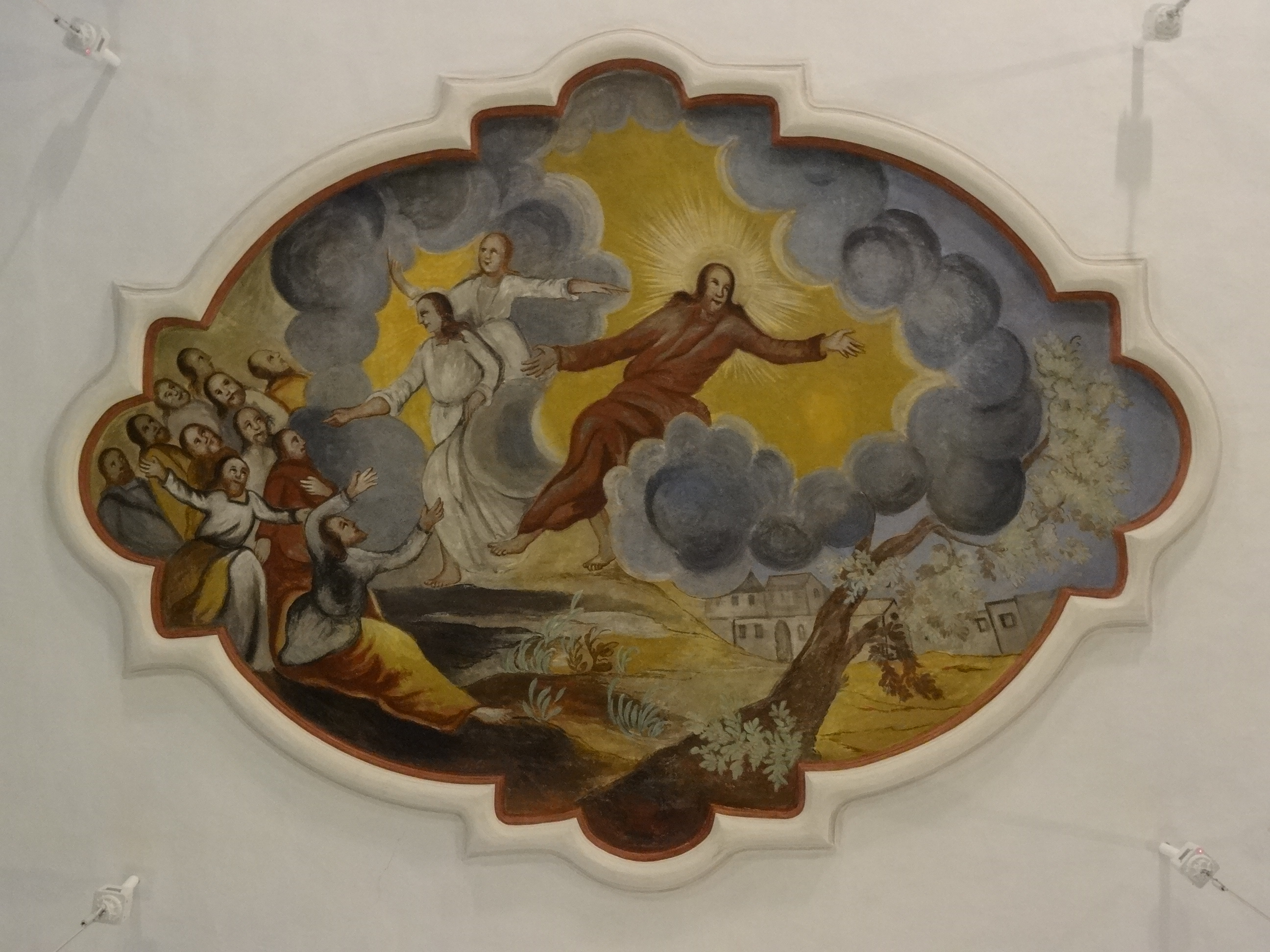 St. Michaelis Oberkleen